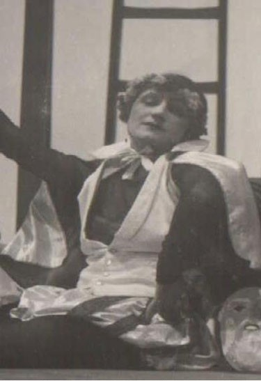 Míra (Miroslava) Holzbachová česká tanečnice, choreografka a novinářka